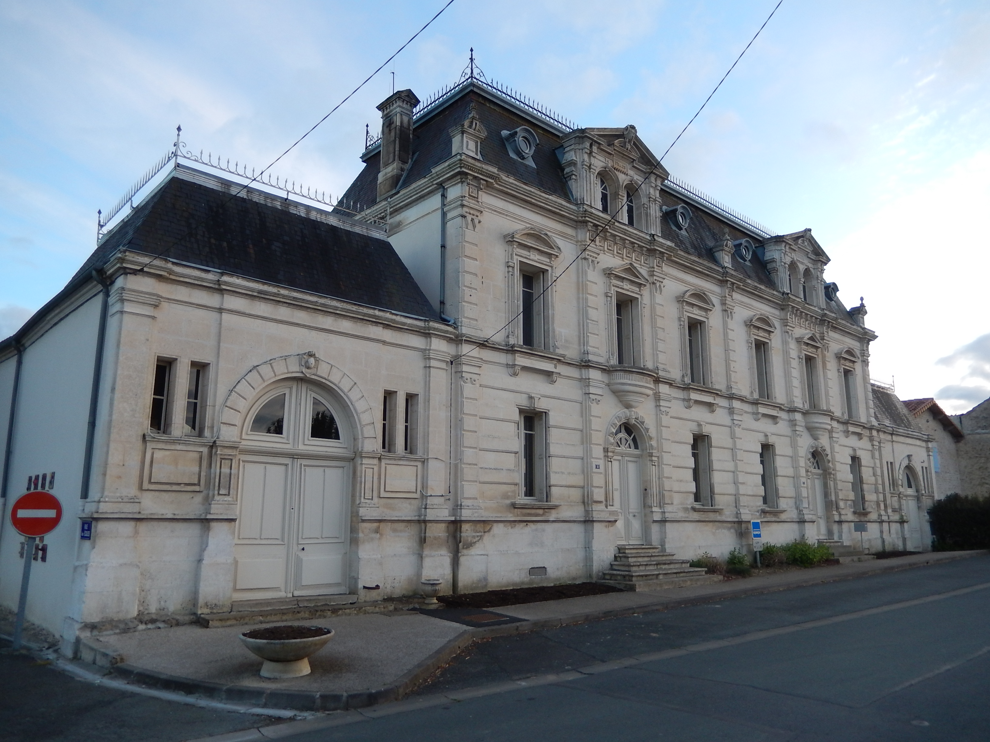 Le bien beau bâtiment de l'école de Loulay (Charente-Maritime, France).